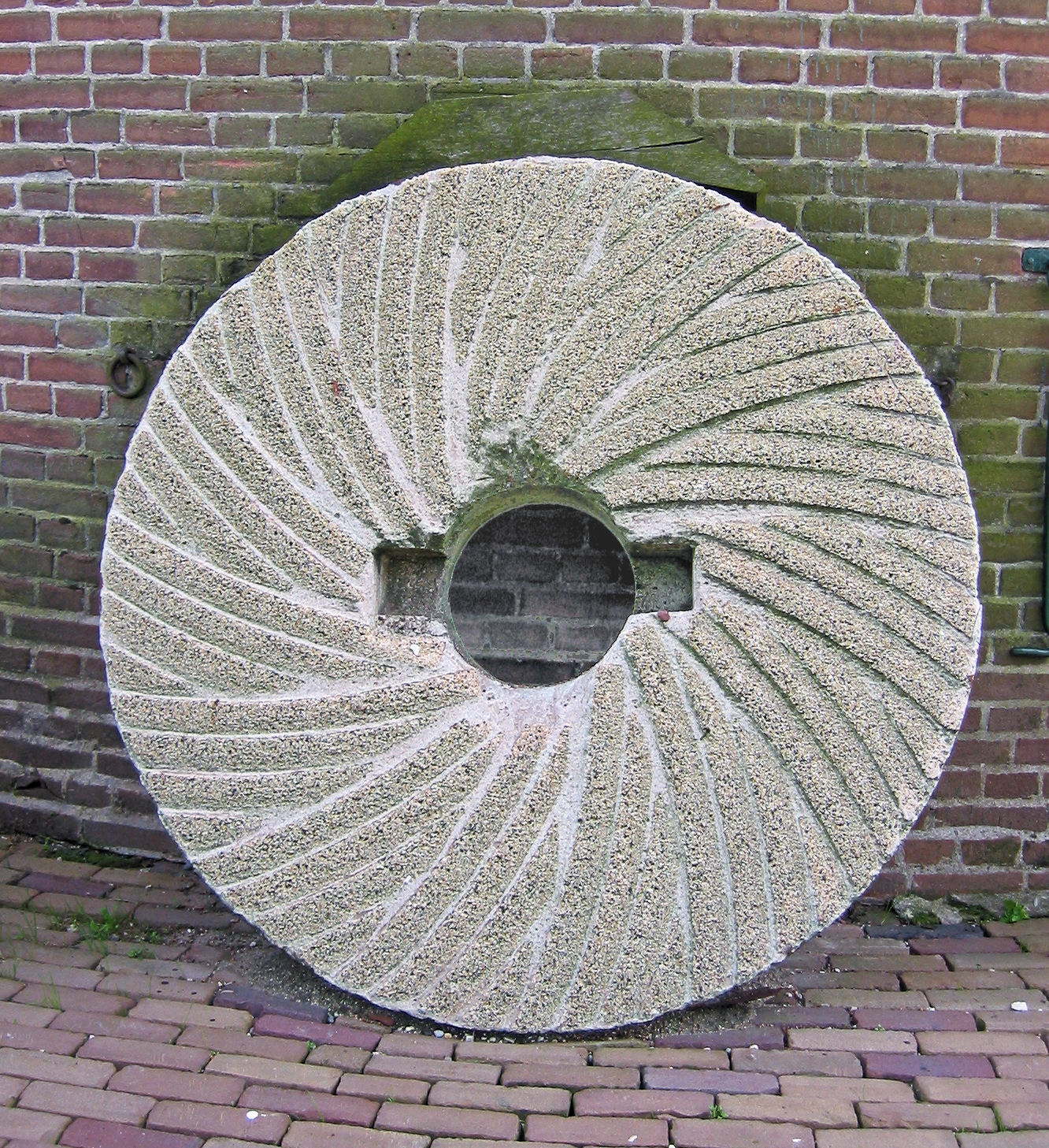 Molenkunststeen met pandscherpsel